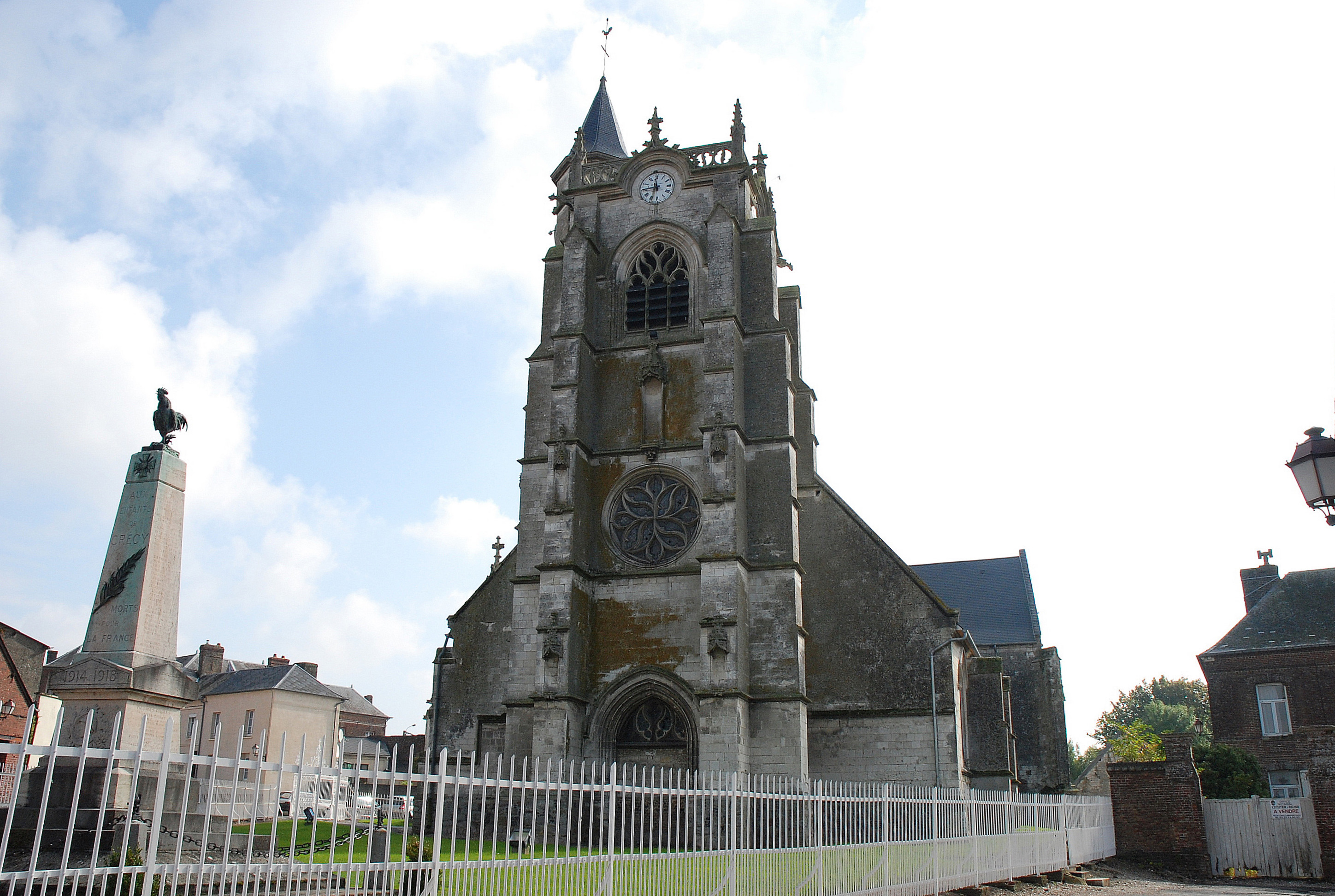 De kerk van Crécy-en-Ponthieu, Frankrijk